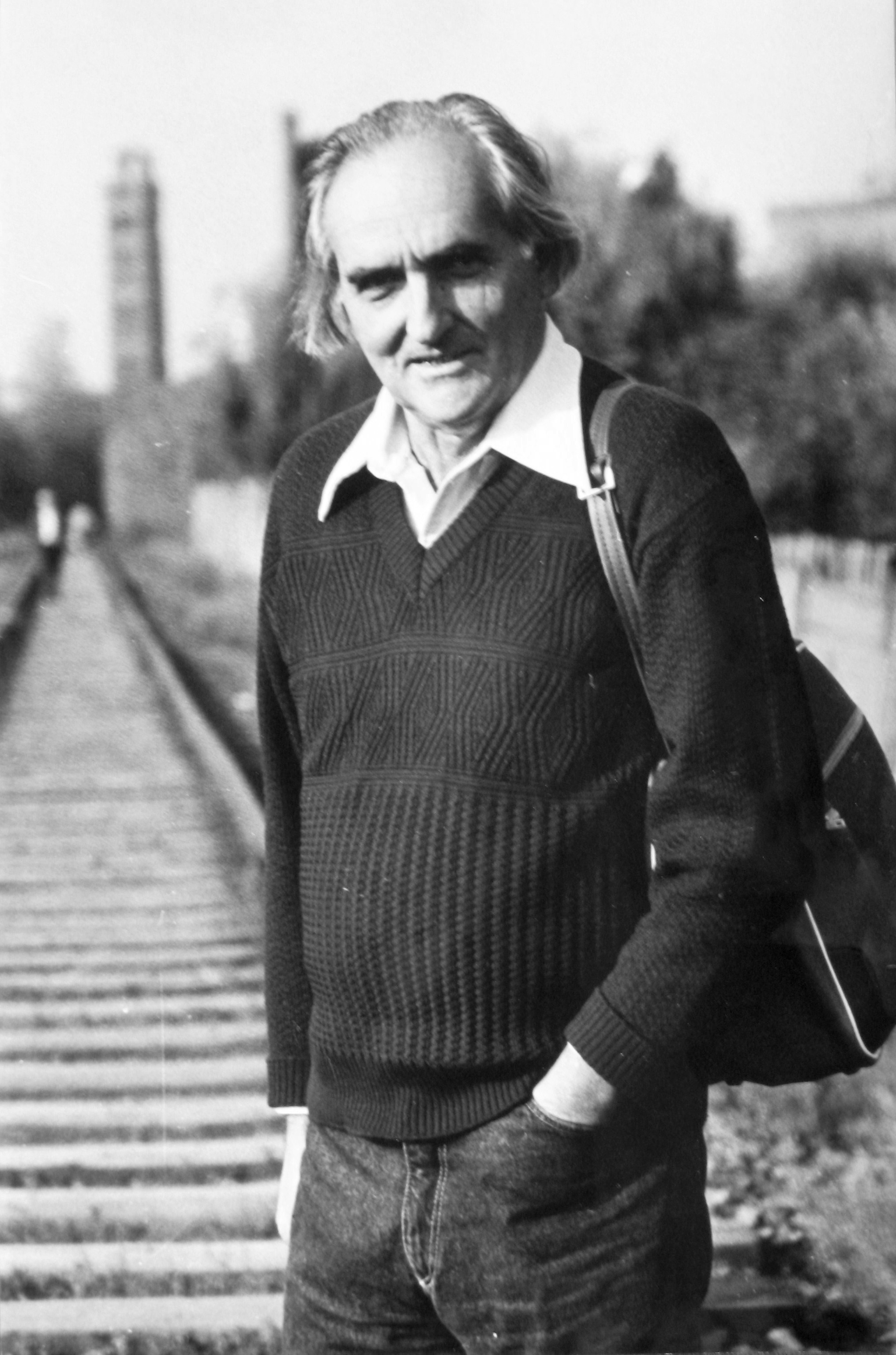 Ярослав Дашкевич дорогою до вул. Козацької у Львові